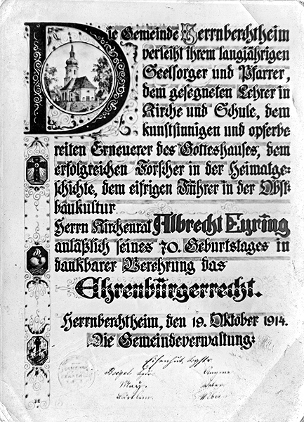 Ehrenbürgerurkunde von Albrecht Eyring